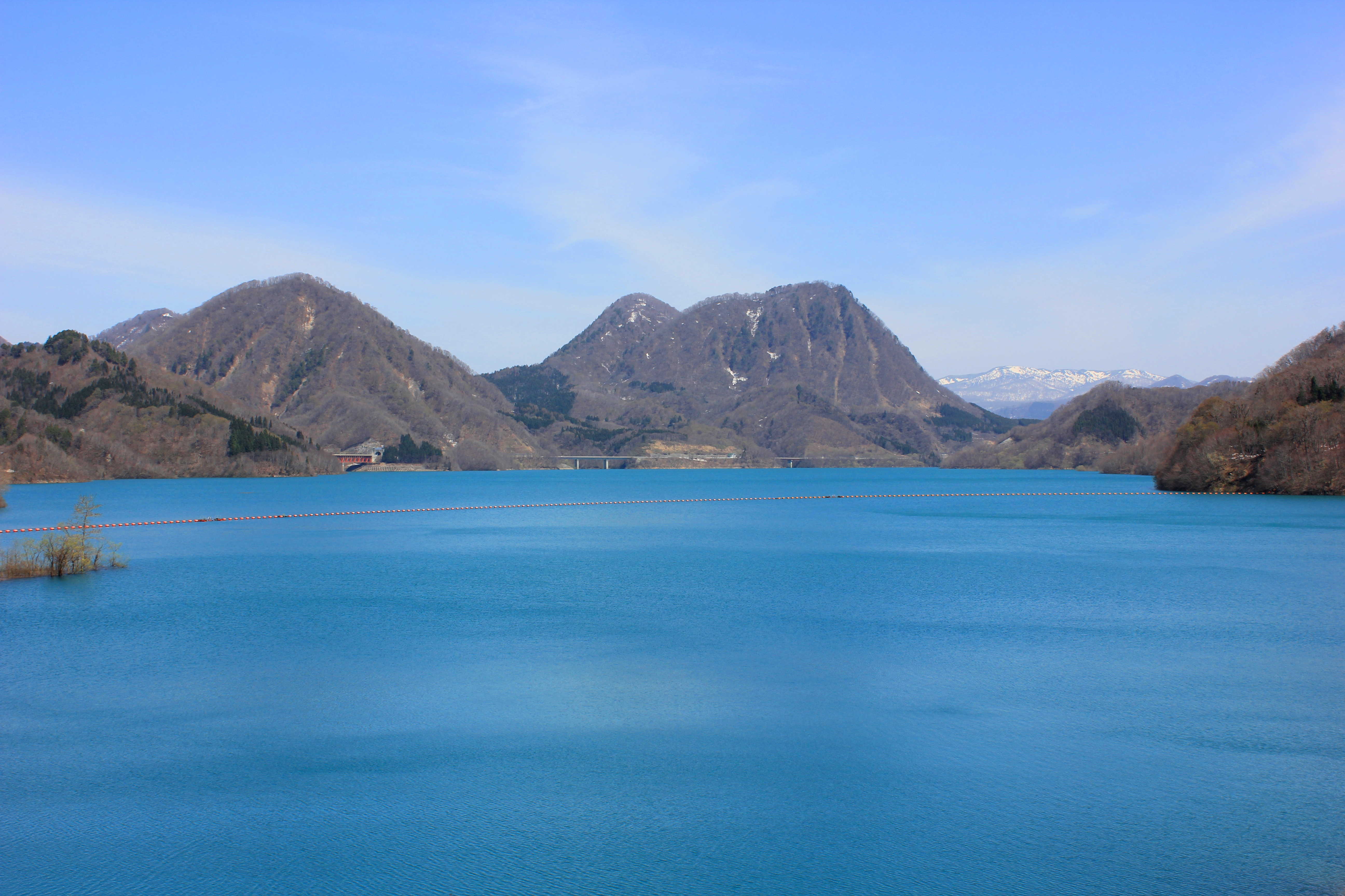 宝仙湖（玉川ダム貯水池。秋田県・玉川）